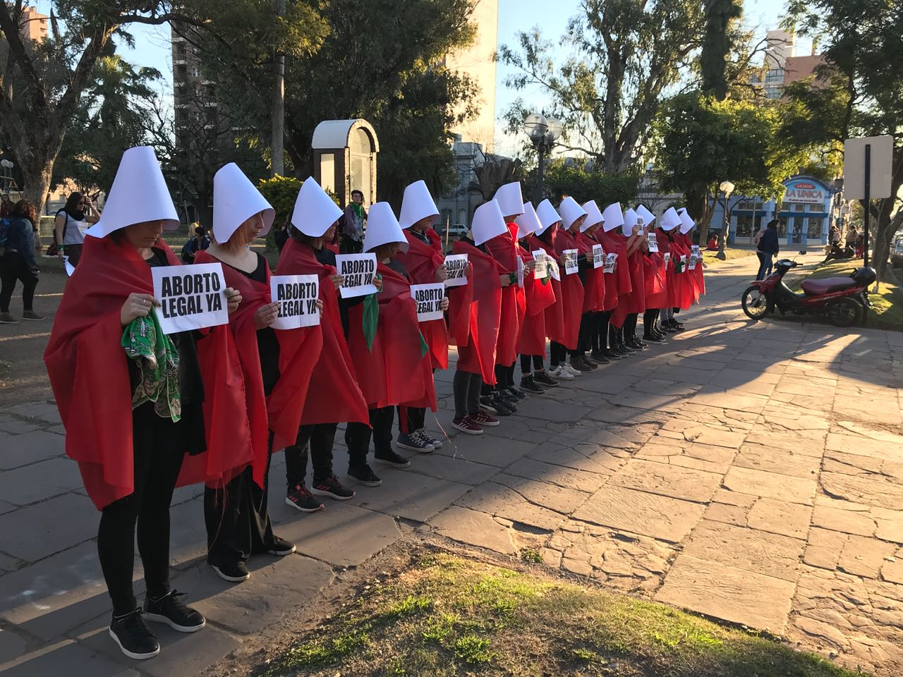 Intervención the handmaid's tale en Santa Fe por el aborto seguro legal y gratuito en Argentina